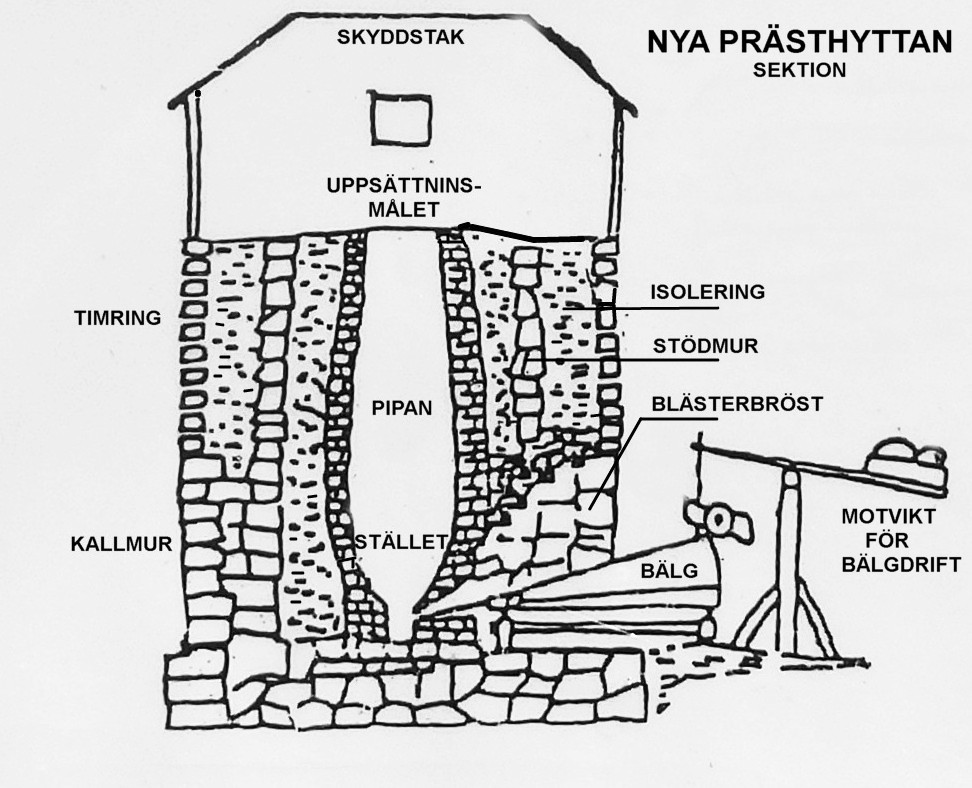 Sektion genom Nya Prästhyttan, kompletterat med text av Holger Ellgaard